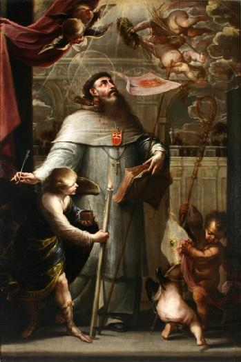 La obra representa al mártir San Pedro Pascual († 1300), que fue obispo de Jaén.